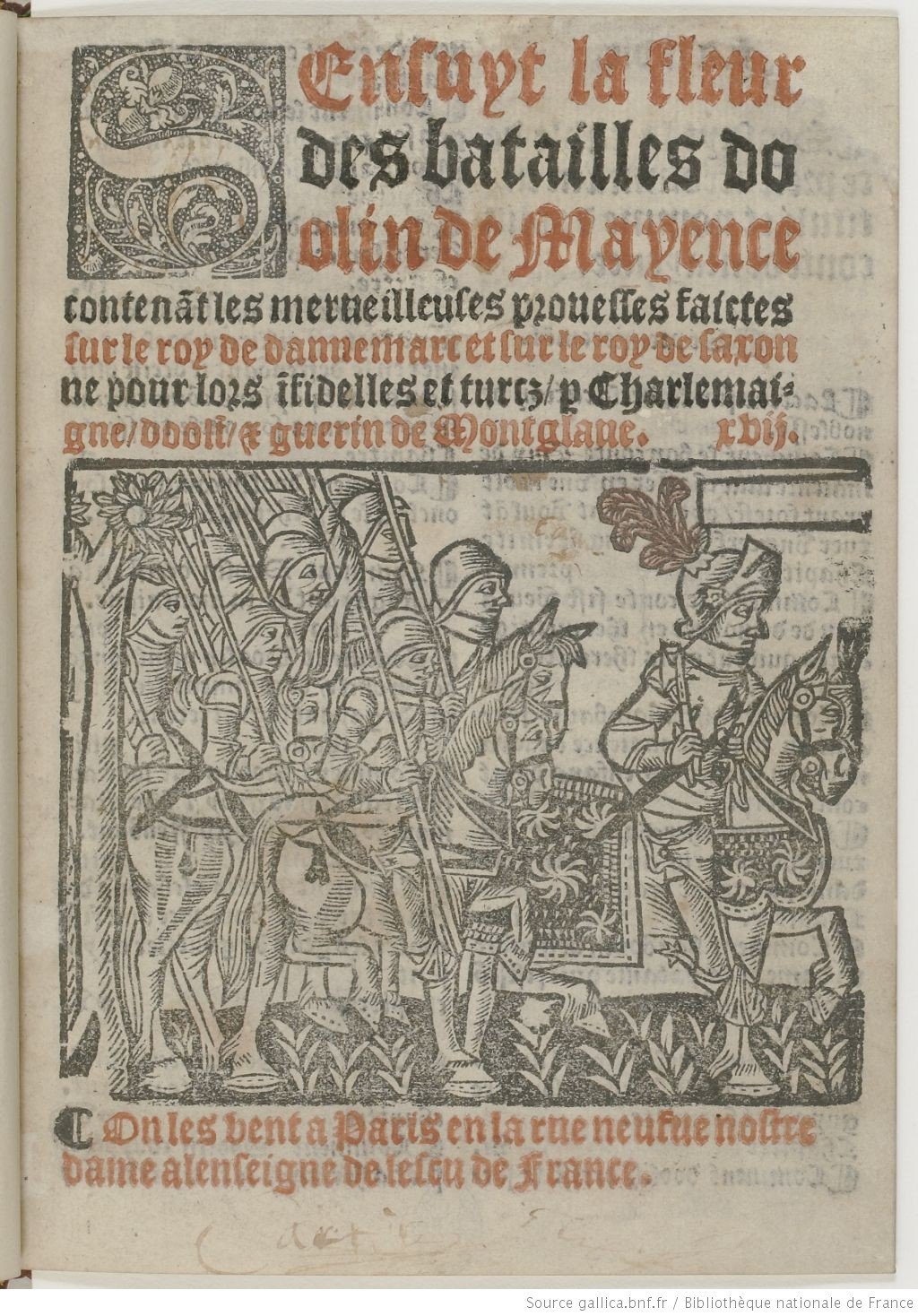 La Fleur des batailles Doolin de Mayence